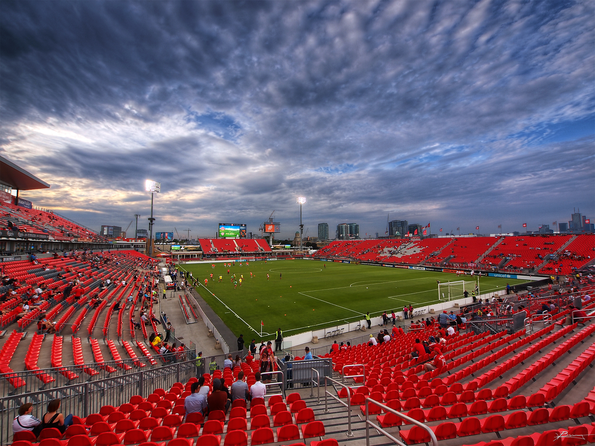 toronto FC stadium